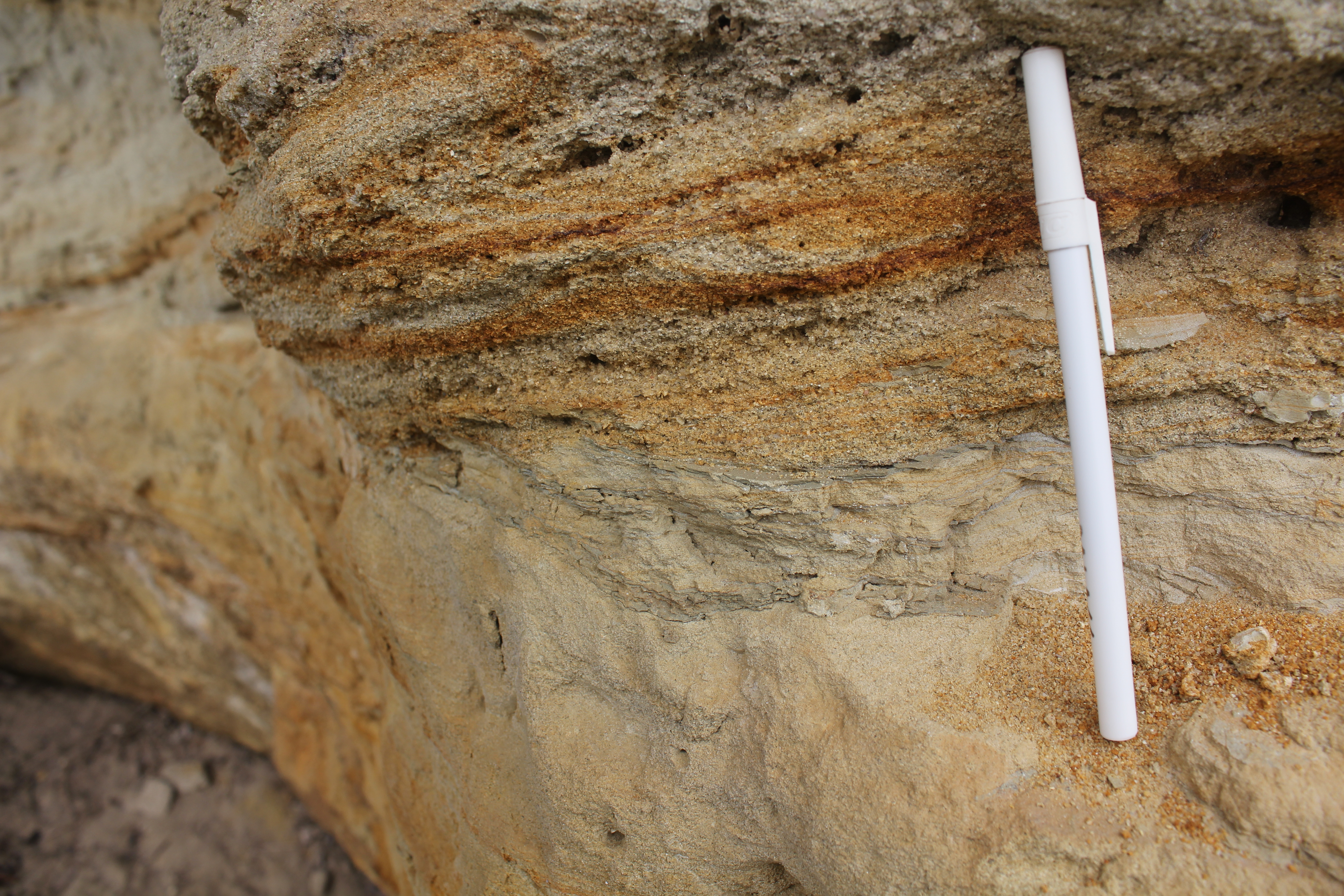 Ausschnitt Ramminger Sandgrube bei Öllingen